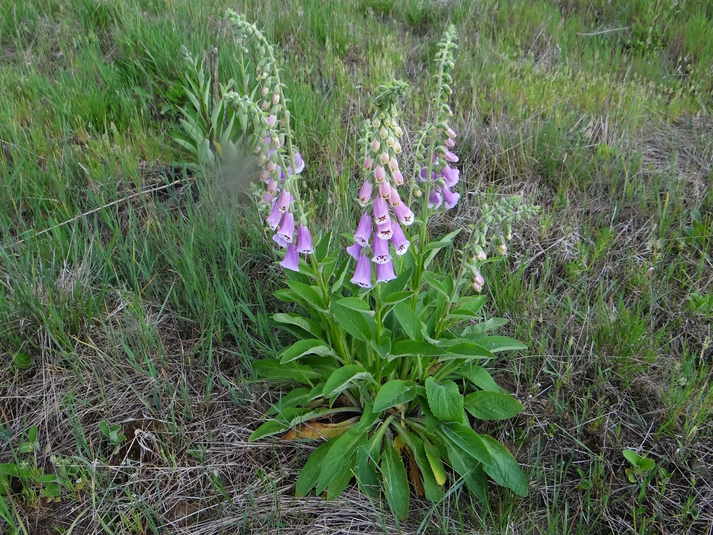 Digitalis purpurea. Location: Poland, Ryczów, województwo śląskie